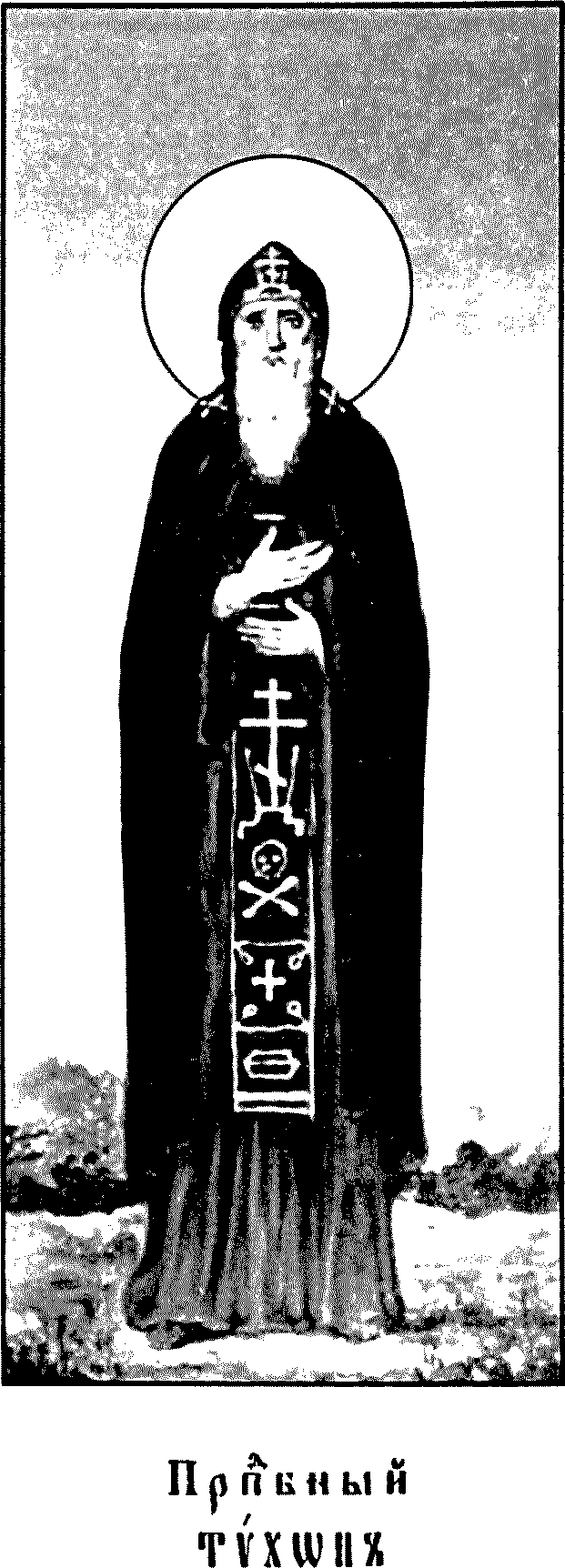 Иллюстрации к книге: Жития святых на русском языке, изложенные по руководству Четьих-Миней с дополнениями, объяснительными примечаниями и изображениями святых